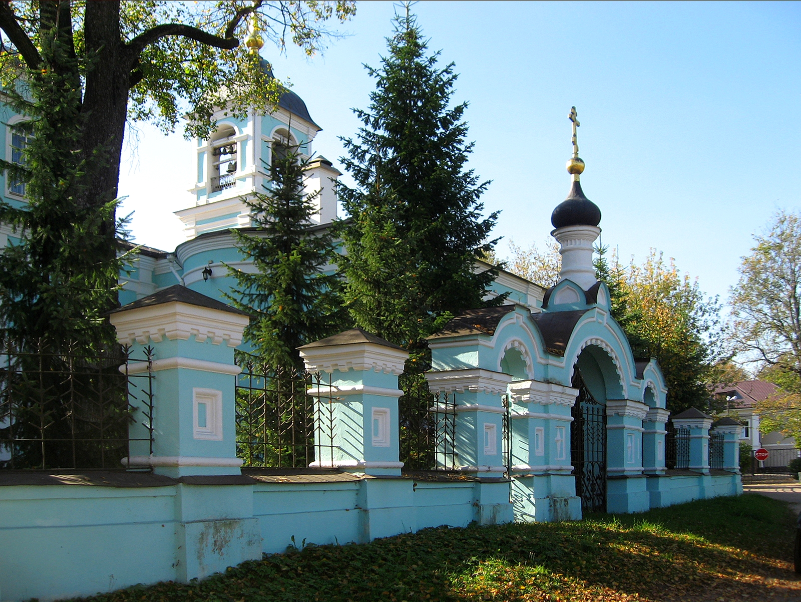 Ограда с воротами: улица Подлипичье, 8, Дмитров, Дмитровский район, Московская область